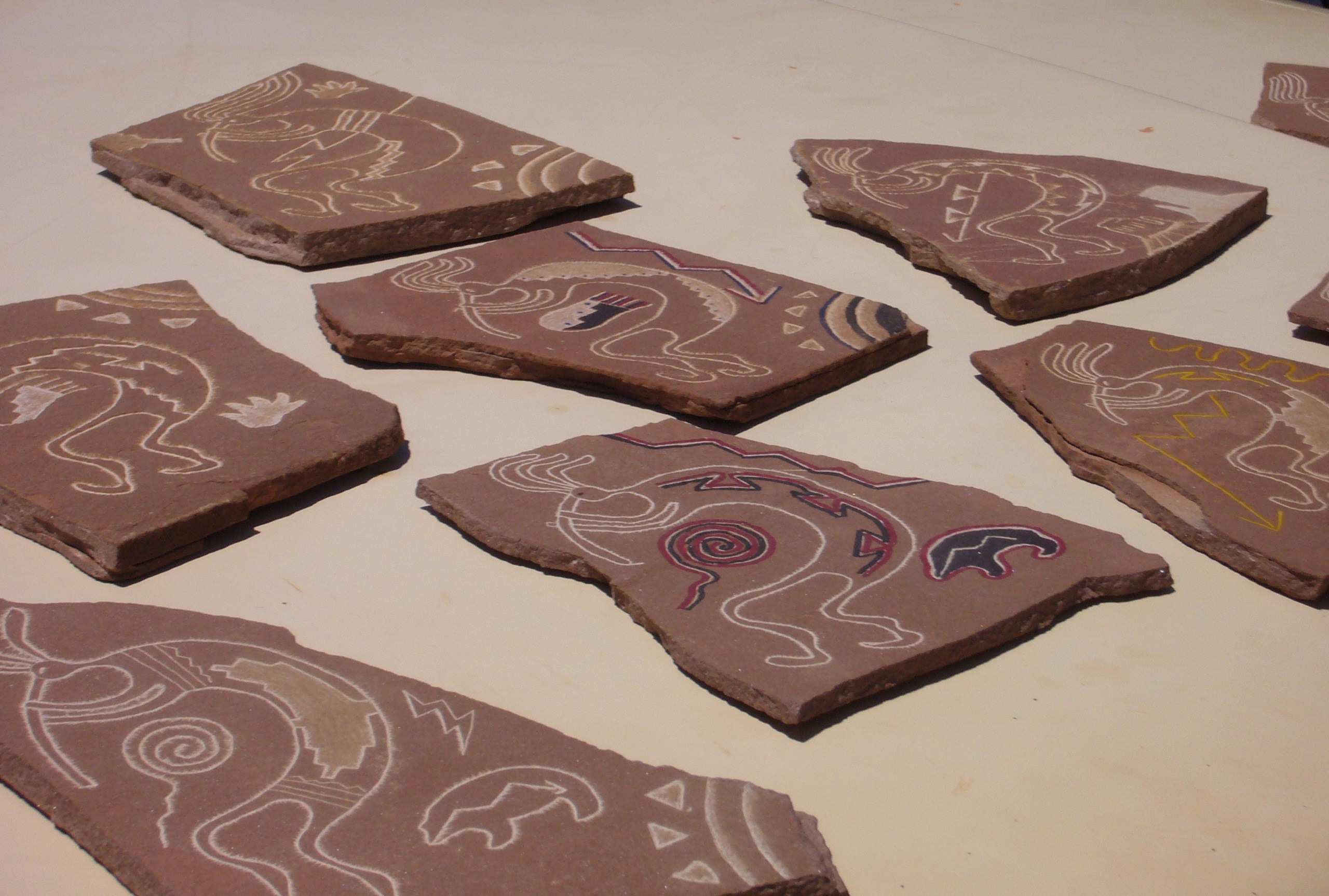 Navajo - art (peinture) - Peintures sur ardoises des Indiens Navajos vendues aux touristes à Monument Valley. On reconnaît sur chaque pièce une silhouette humaine associée à différents symboles, figuratifs ou non comme l'ours ou la spirale-labyrinthe. Natives Americans